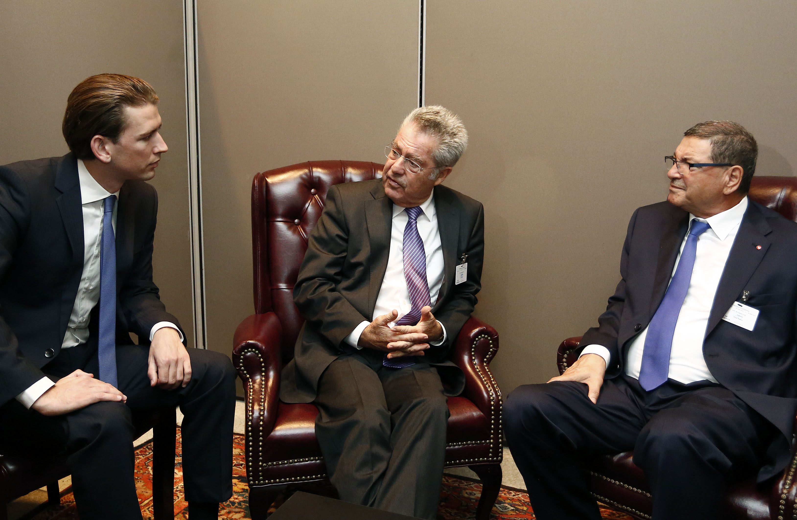 UNO Generalversammlung. BM Sebastian Kurz und BP Heinz Fischer treffen den tunesischen Ministerpräsidenten, Habib Essid. New York, 28.09.2015, Foto: Dragan Tatic